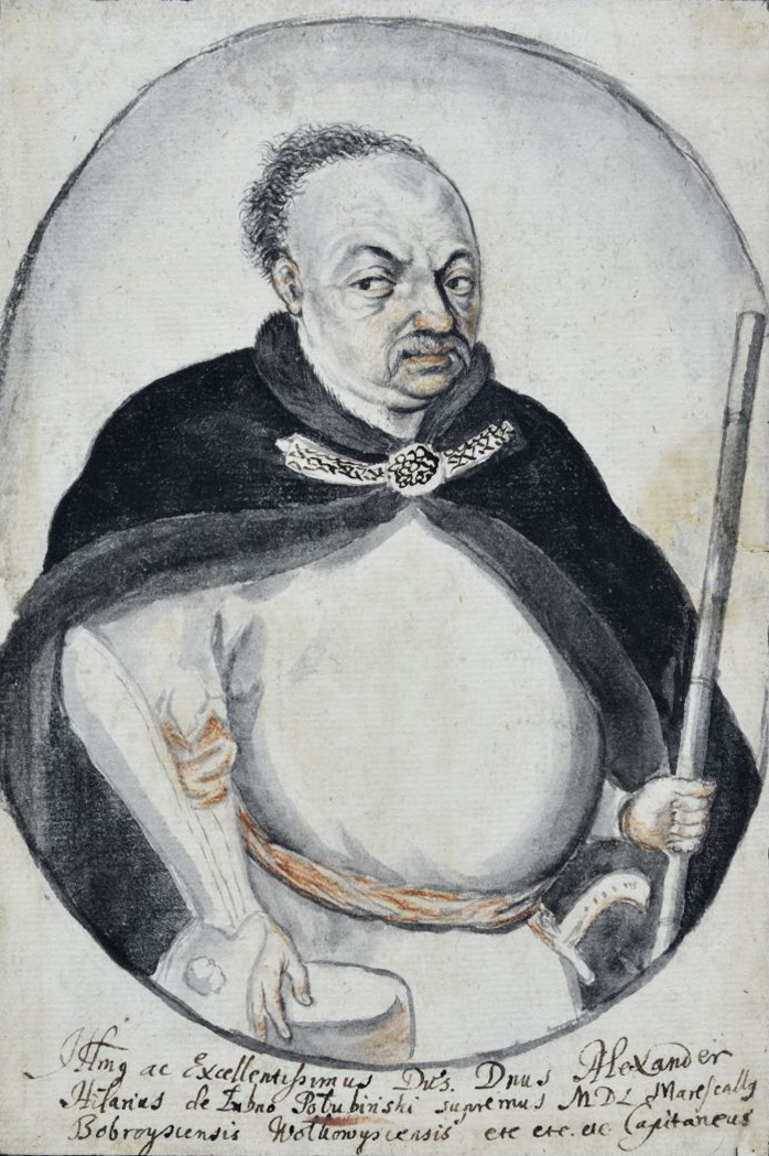 Беларуская (тарашкевіца): Партрэт Аляксандра Гілярыя Палубінскіага (Alaksandar Hilary Pałubinski) гербу ўласнага (1626—1679), дзяржаўнага і вайсковага дзеяча Вялікага Княства Літоўскага, пісара польнага, падстолія і маршалка вялікага, старосты генэральнага жамойцкага.